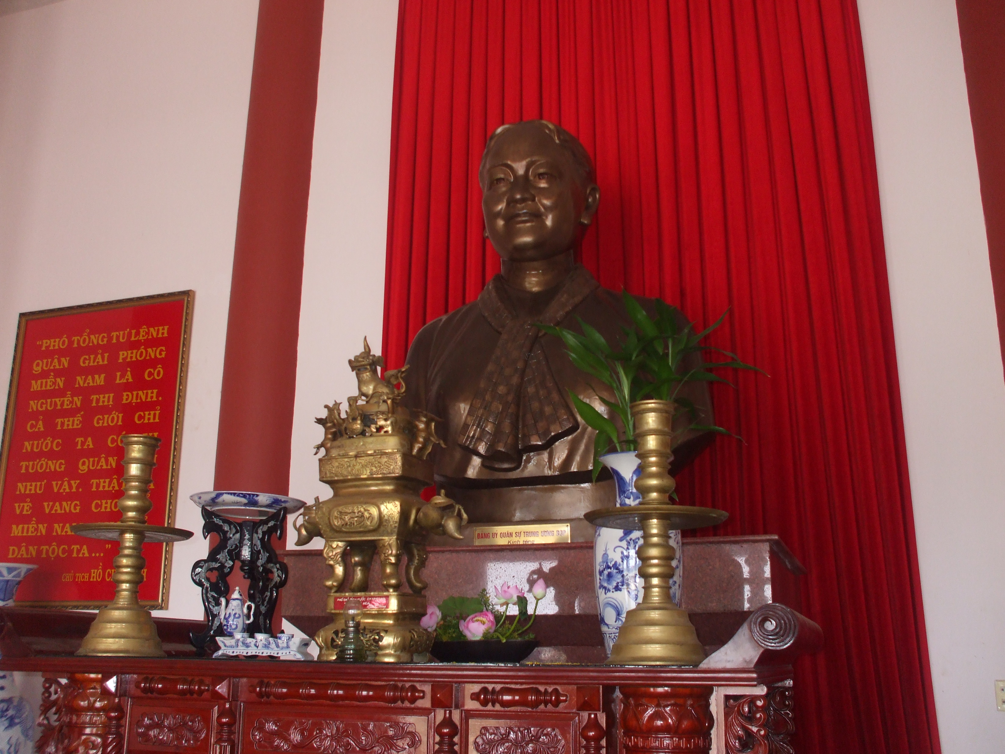 Tượng đồng nữ tướng Nguyễn Thị Định (1920-1992) trong đền thờ bà tại ấp Phong Điền, xã Lương Hòa, huyện Giồng Trôm (tỉnh Bến Tre, Việt Nam).